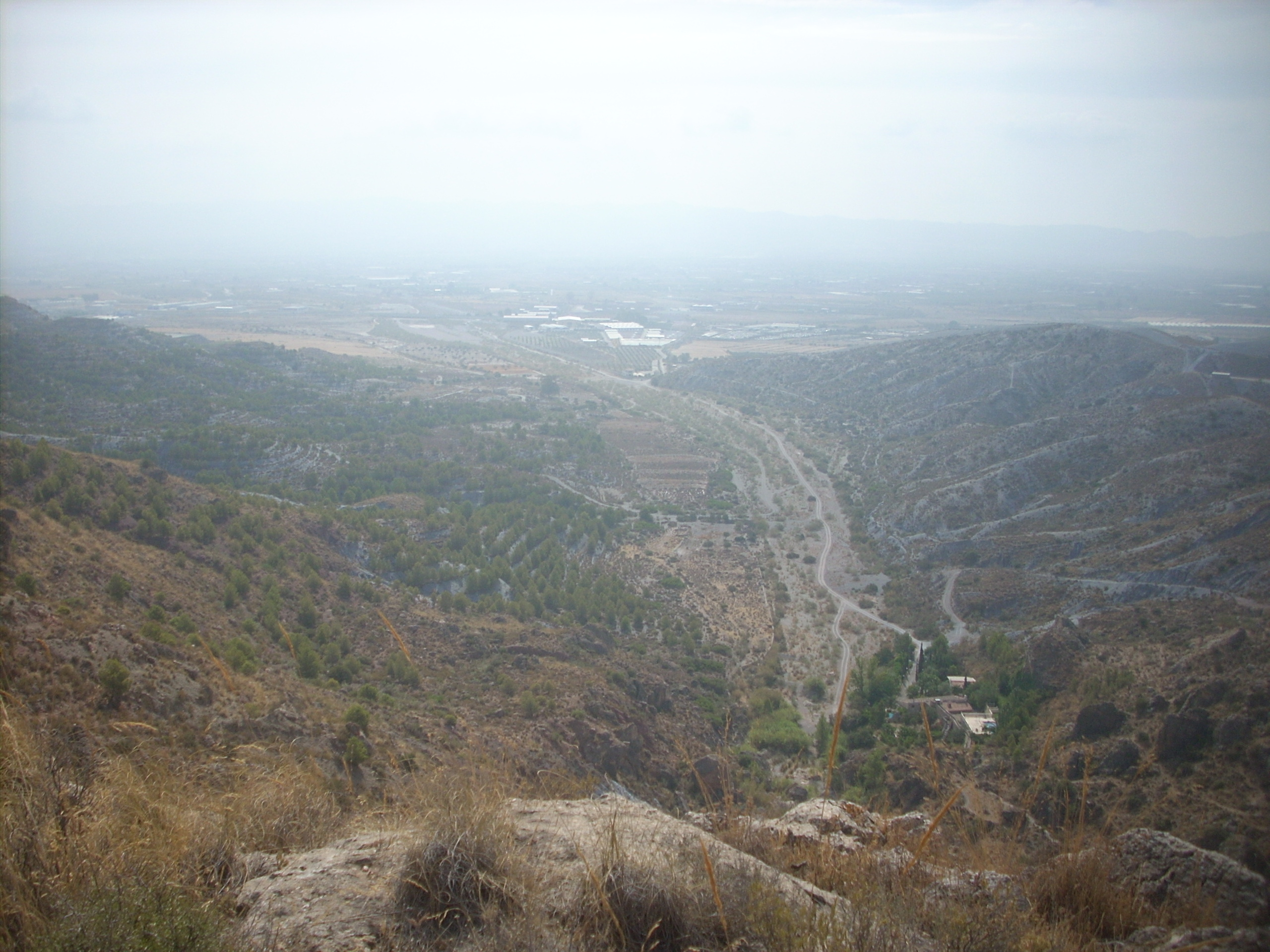 Vista de la Rambla de Béjar desde las Peñas de Béjar